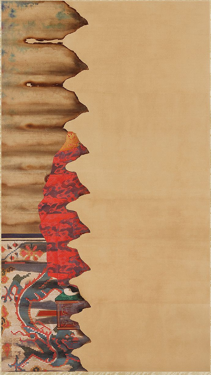 朝鮮肅宗御眞